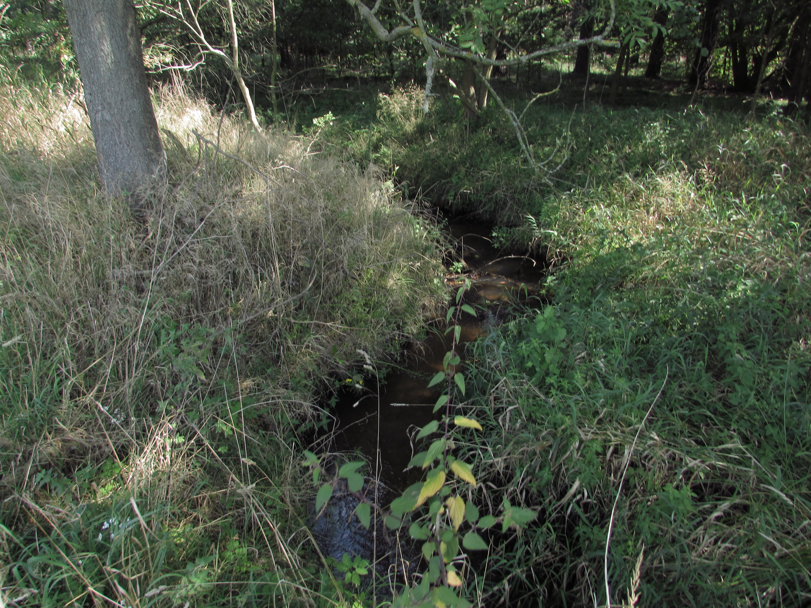 litzenbach in der eulenmühle